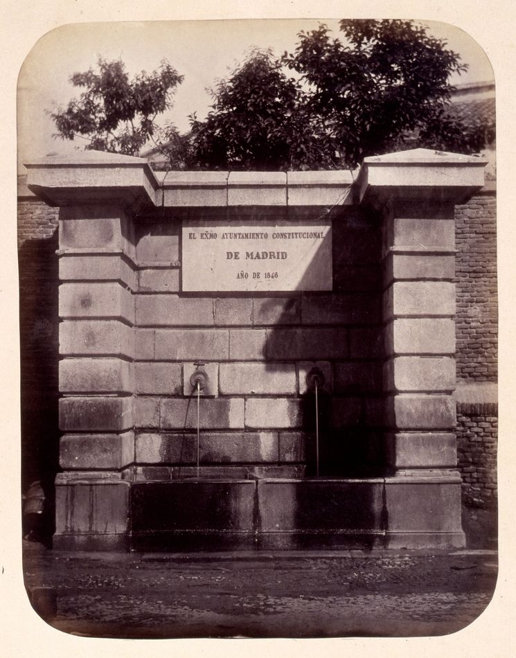 Fuente en la calle de Luchana de Madrid. Obra en 1864 del fotógrafo toledano Alfonso Begué, muerto el 31 de octubre de 1865. Cartulina sepia. Albúmina. 43 x 32 cm. Fotografía contenida en un álbum procedente del Archivo de Villa y trasladado al Museo de Historia en 1983.